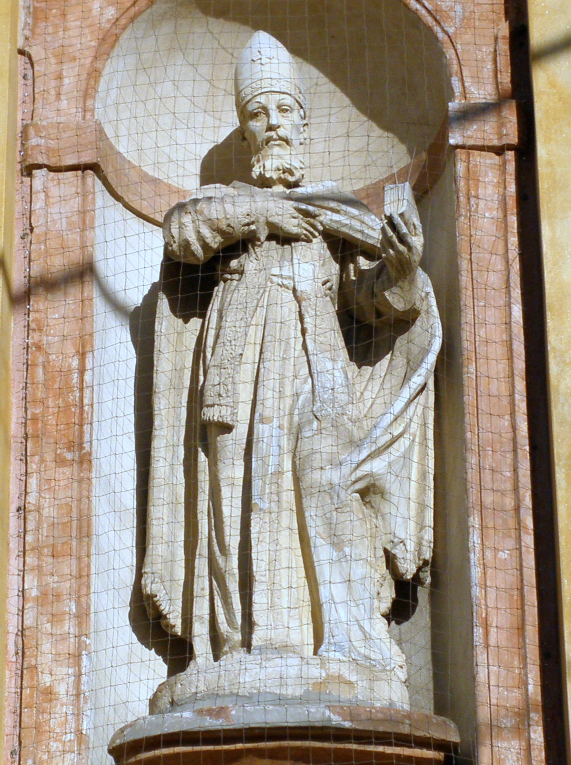 Occhiobello, Chiesa Arcipretale di San Lorenzo, Diacono e Martire: la statua di San Maurelio, opera di Pietro Turchi, che adorna la parte destra della facciata barocca della chiesa.